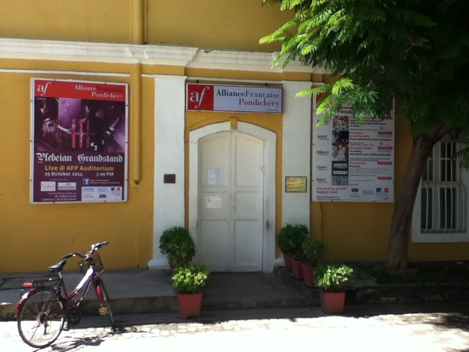 Photo de le l'entrée du bâtiment de l'Alliance Française de pondichéry